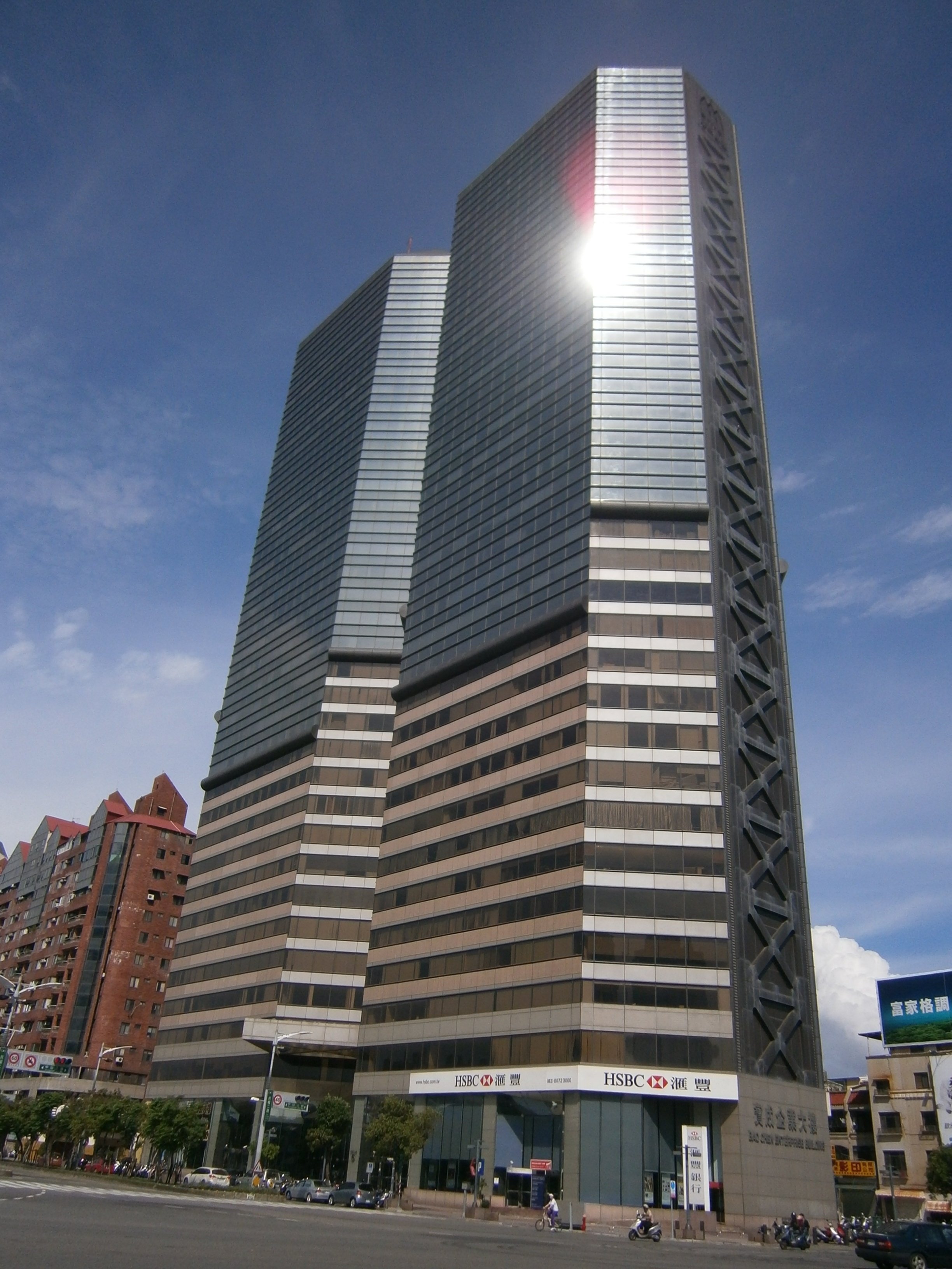 寶成企業大樓，寶成建設建造，位於高雄市前鎮區民權二路6號。